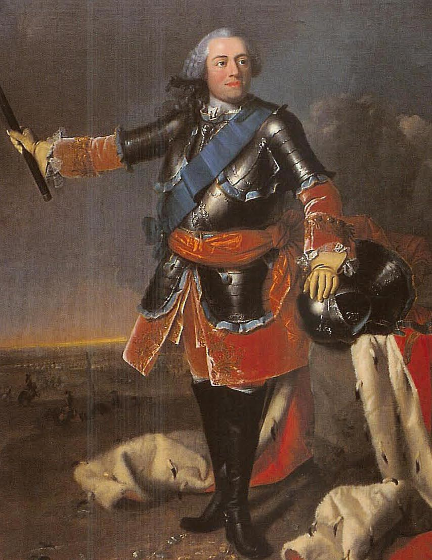 Portret van stadhouder Willem IV van Oranje-Nassau (1711-1751)